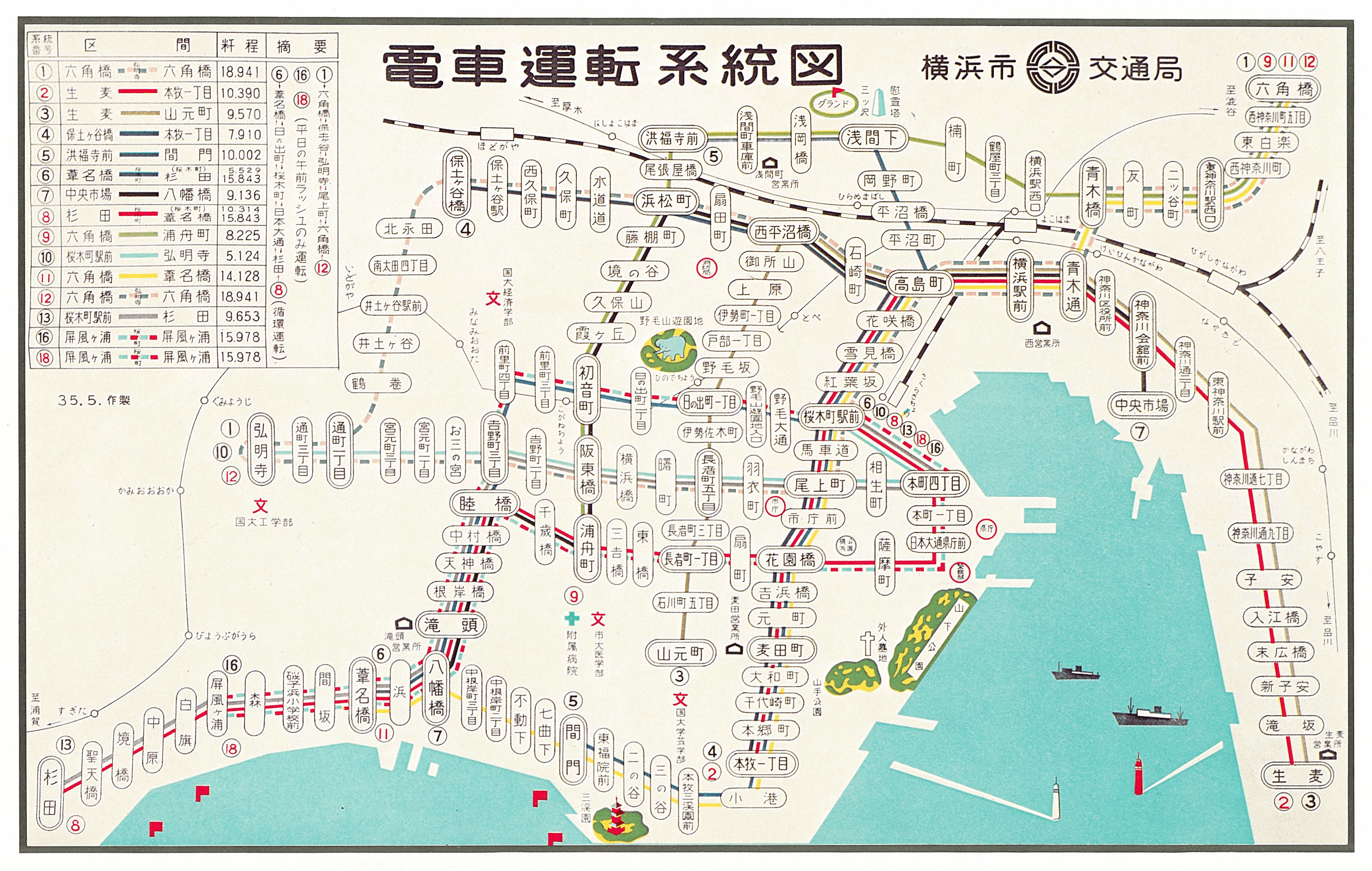 昭和38年（1963年）3月作成の、横浜市営電車の運転系統図。